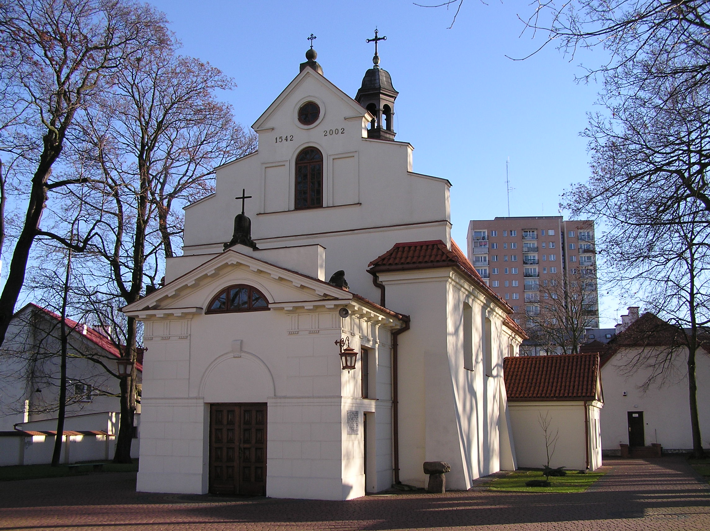 Kościół parafialny pw. św. Marii Magdaleny na Wawrzyszewie, Warszawa